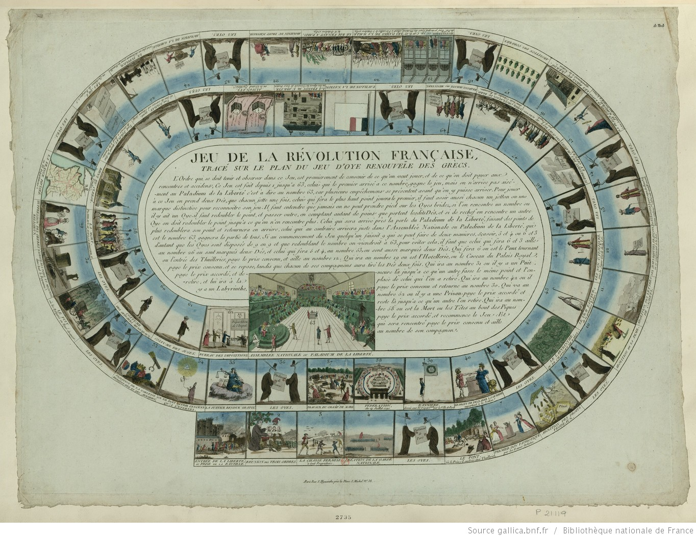 Plateau de jeu de l'oie.